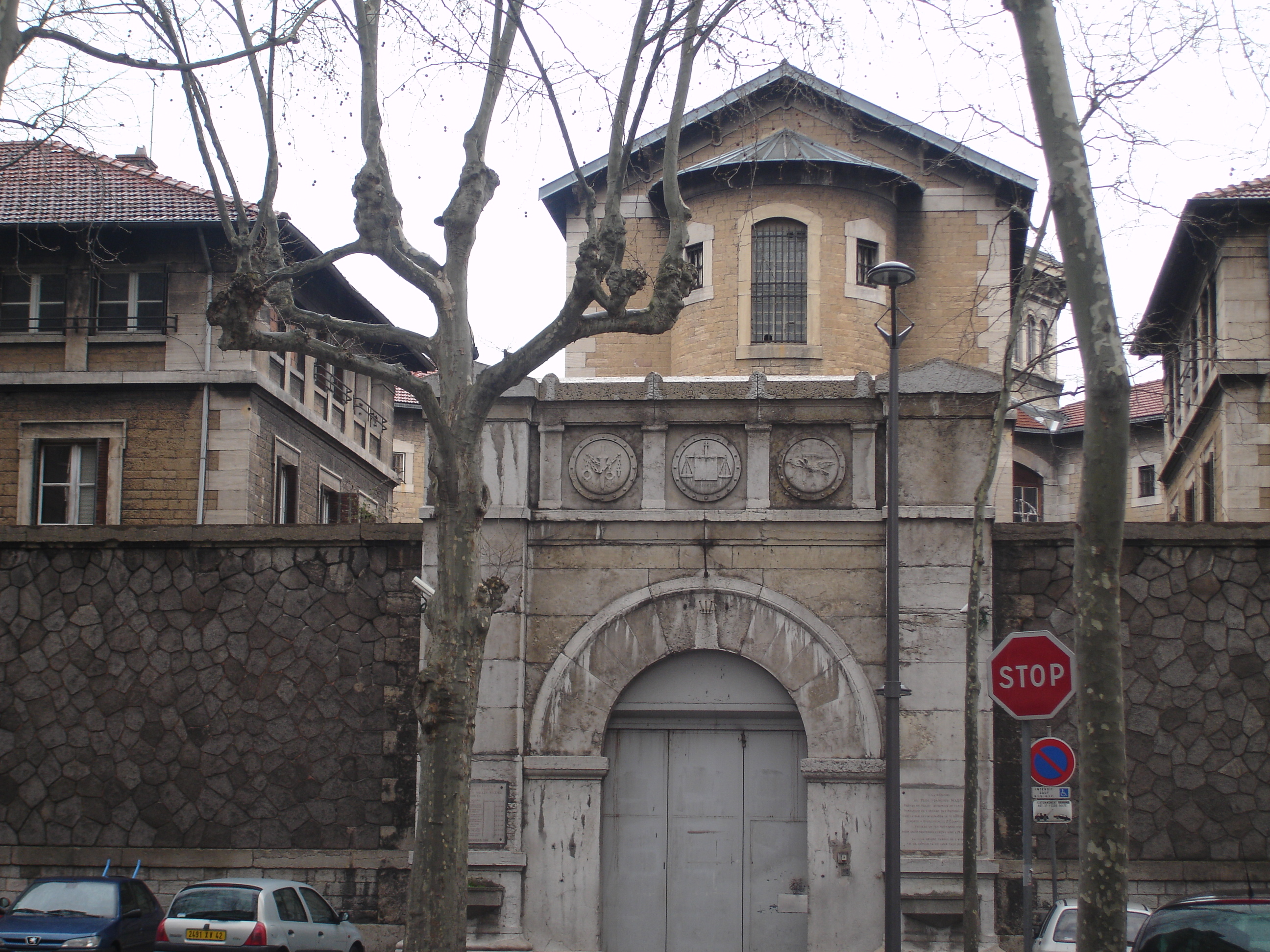 Prison Saint-Paul de Lyon : L'entrée